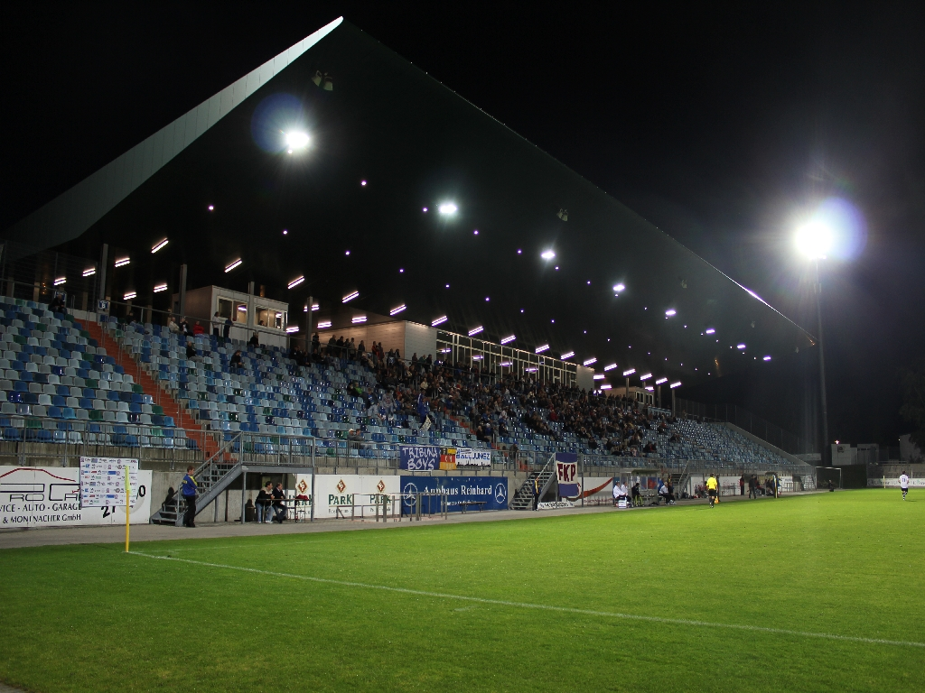 Bild der Haupttribüne im Sportpark Husterhöhe, Pirmasens.